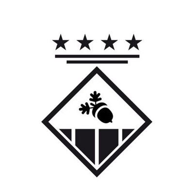 Escut municipal de Sant Esteve de les Roures